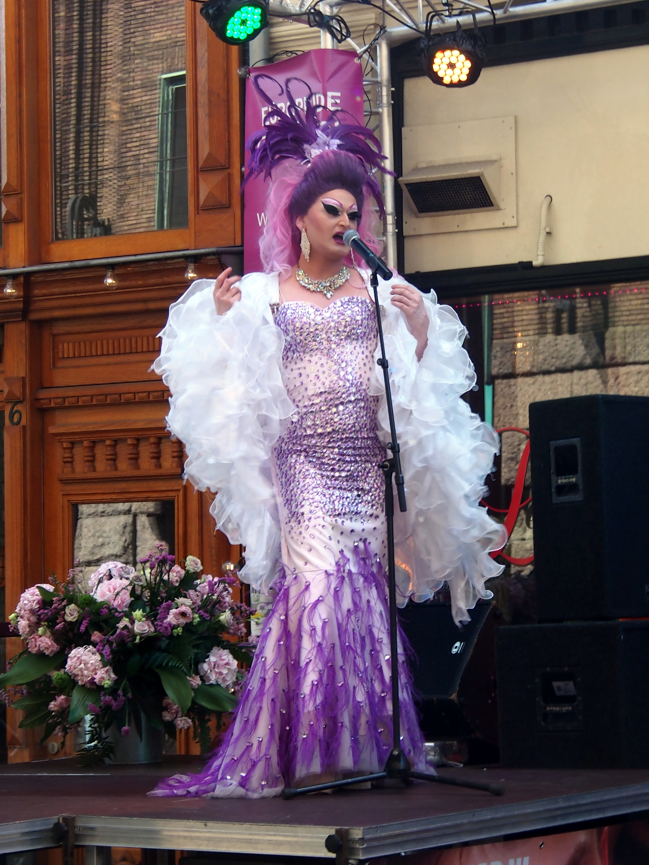 Photographed in Amsterdamam, Gaypride 2016 in the Utrechtsestraat.